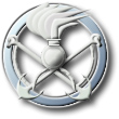 Fregio genio pontieri, esercito italiano